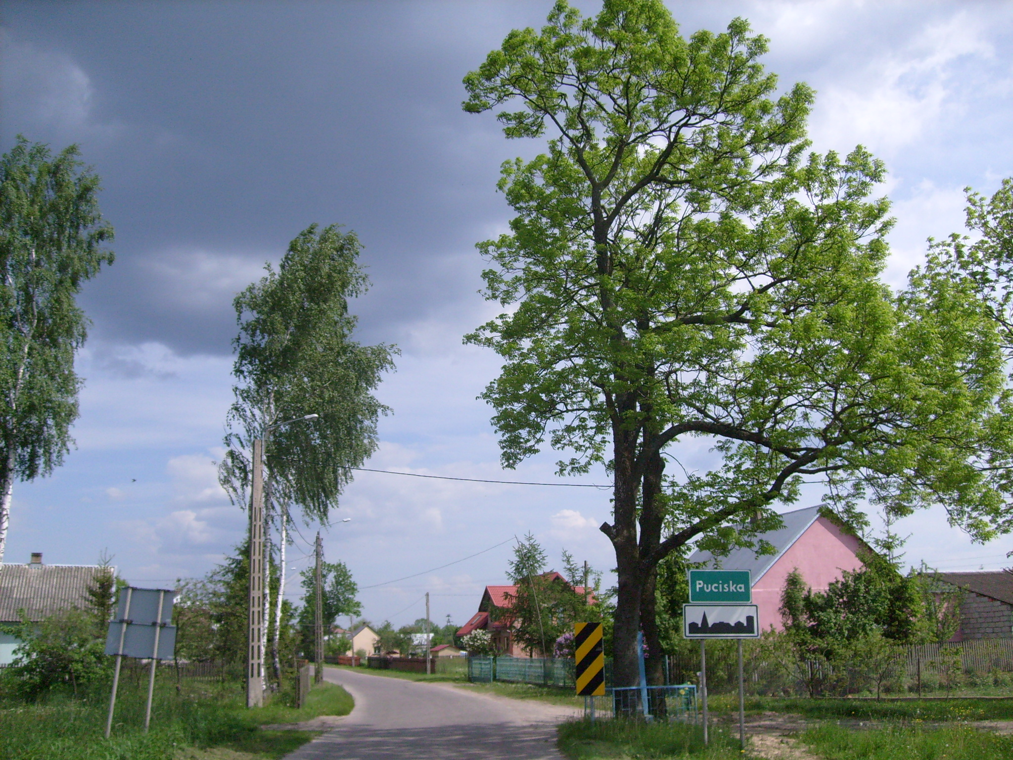 Puciska